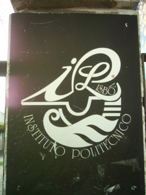 Placa com logótipo do Instituto Politécnico de Lisboa, afixada ao portão da sua sede, em Benfica.